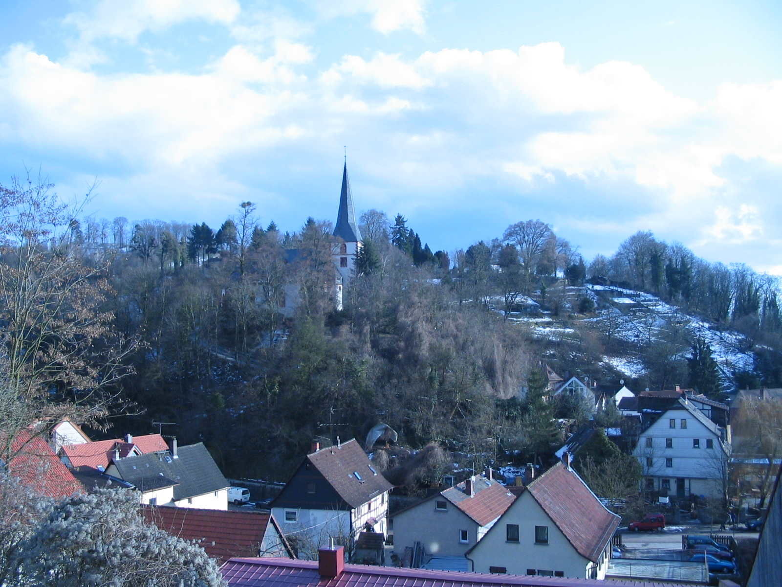 Blick auf Bensheim-Auerbach mit Bergkirche im Vorfrühling